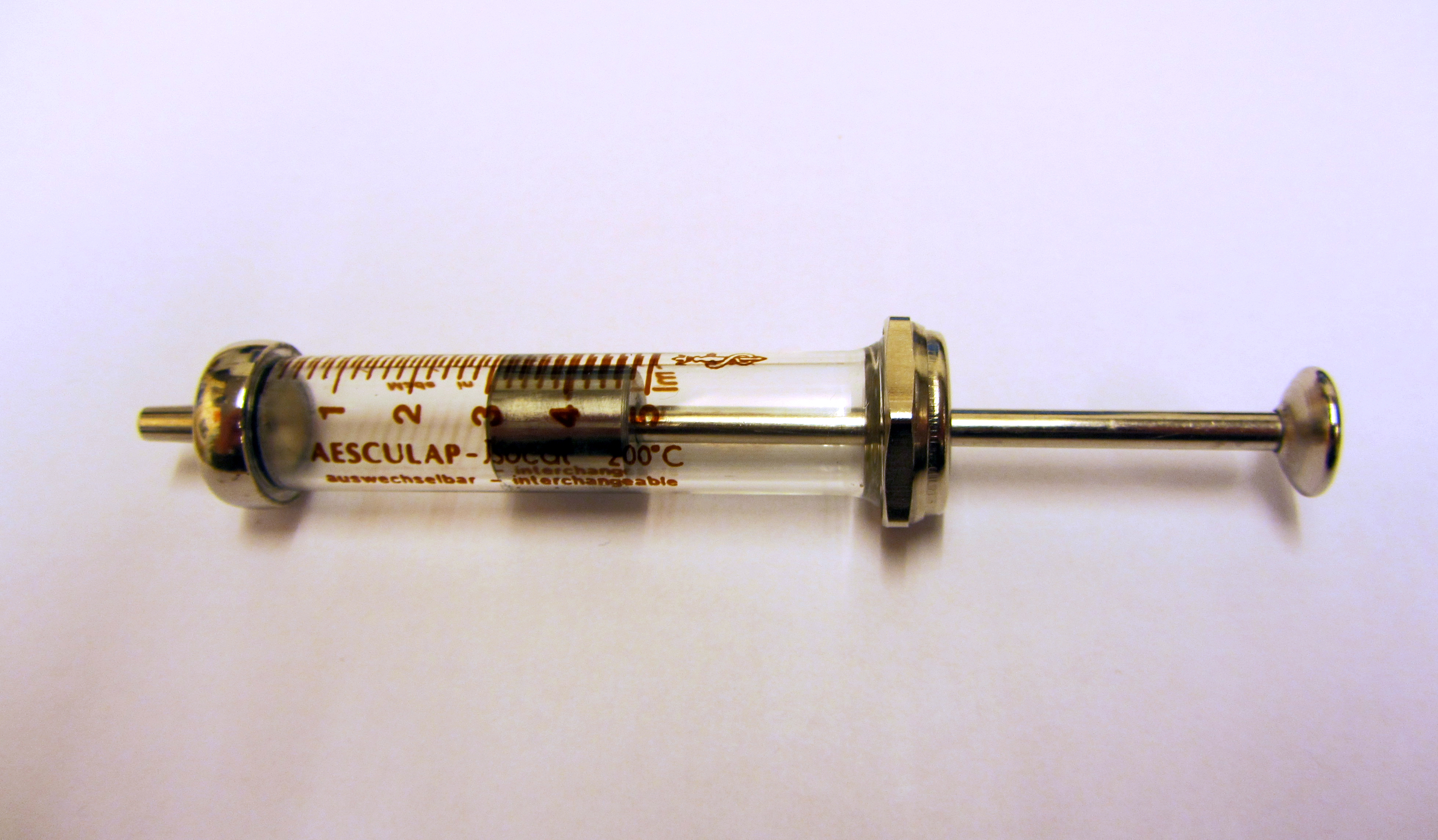 Historische Rekordspritze, Glas/Metall, demontierbar